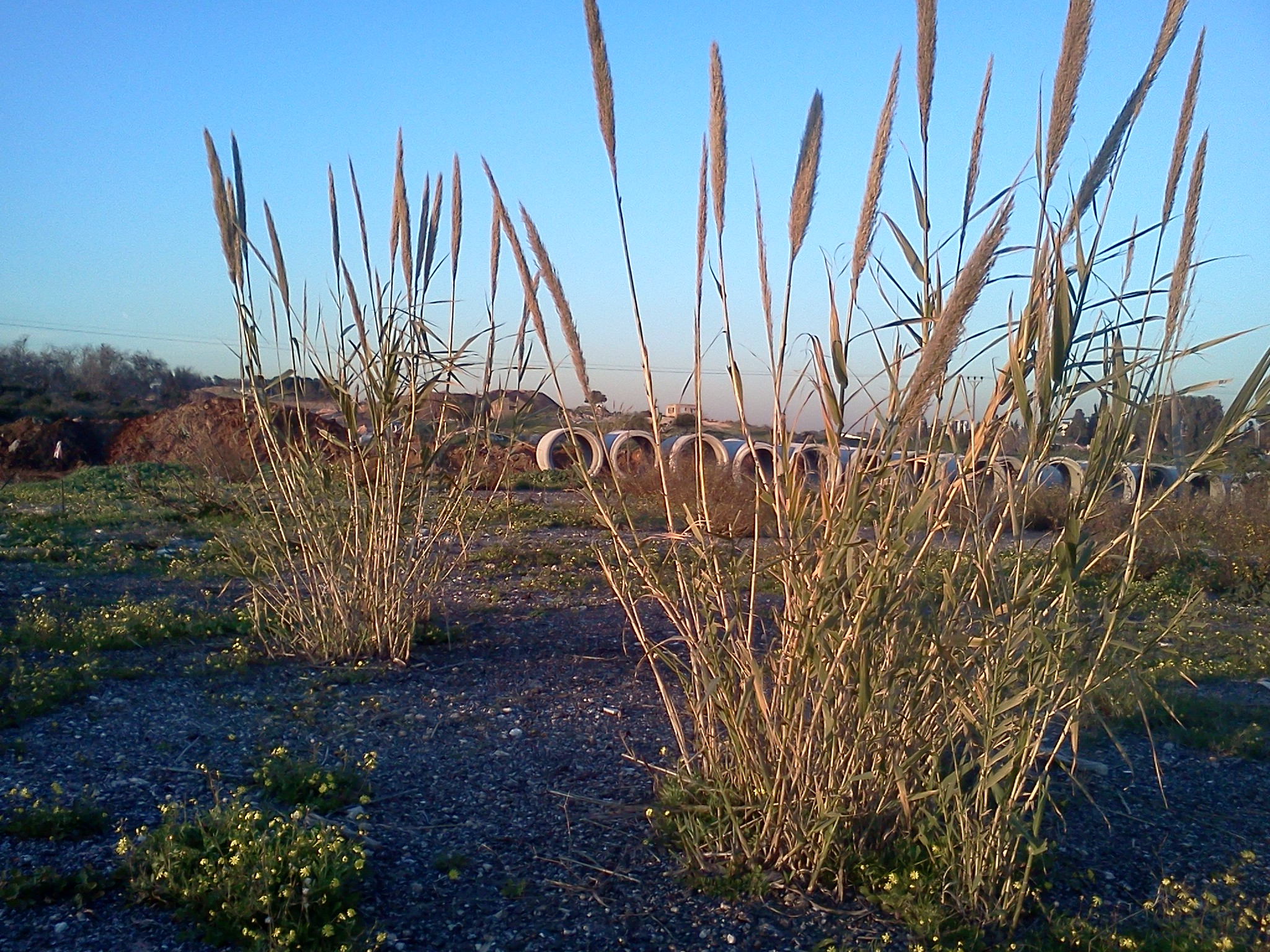 צמחייה בוואדי למון